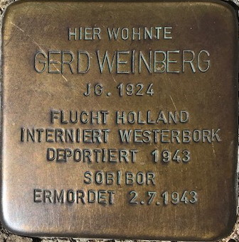 Stolperstein von Gerd Weinberg in Bad Sassendorf Kaiserstrasse